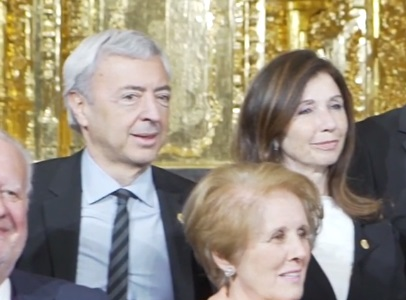 El Palacio de La Merced en Córdoba acogió ayer la ceremonia de entrega de las Medallas de Oro al Mérito en las Bellas Artes 2017 a más de una veintena de personalidades, con las que el Ministerio de Cultura y Deporte ha distinguido a personas y entidades que hayan destacado en el campo de la creación artística y cultural o hayan prestado notorios servicios en el fomento, desarrollo o difusión del arte y la cultura o en la conservación del patrimonio artístico.